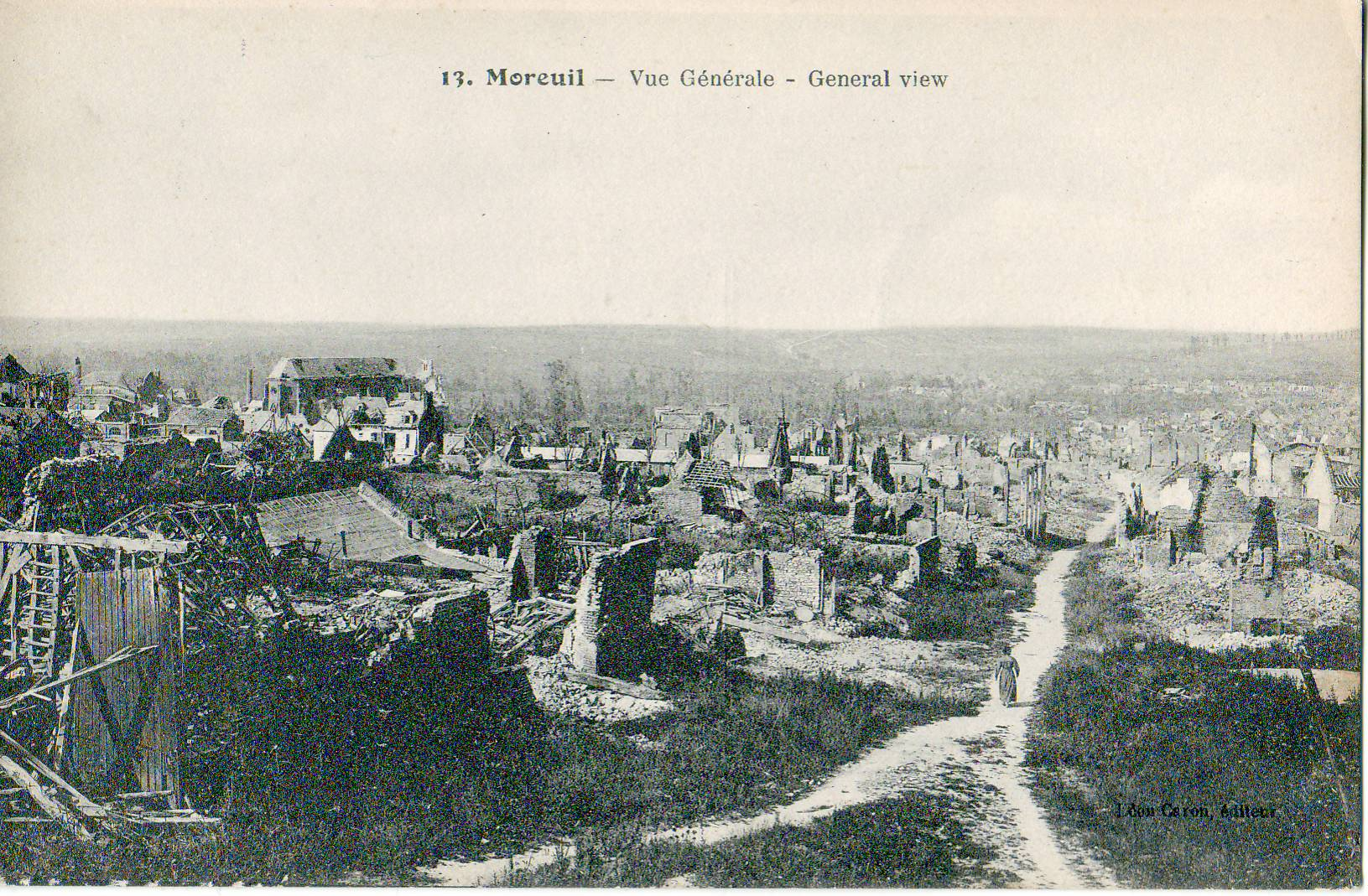 Carte postale ancienne éditée par CaronMoreuil (Somme, Picardie, France) : Vue généraleVue des ruines de la ville peu après la fin de la Première Guerre mondiale